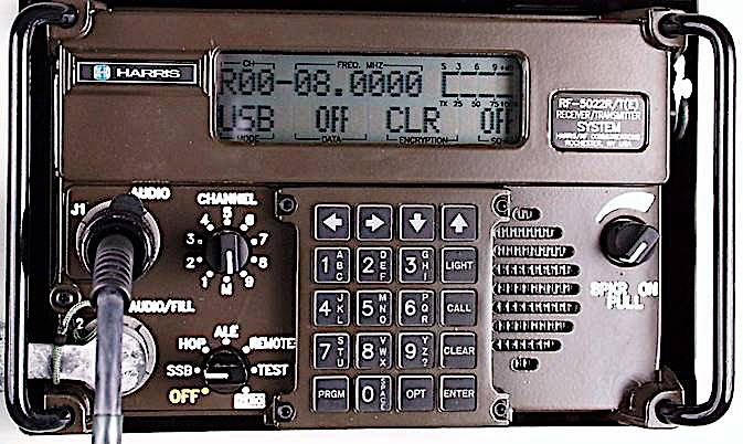 Transceiver HARRIS RF-5022 RT-E (100mW)